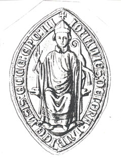 Bischof Johannes III. von Tralau; Abbild auf seinem Siegel. Zeichnerische Wiedergabe in der Sammlung Milde, Bl. 14. Archiv der Hansestadt Lübeck = AHL.